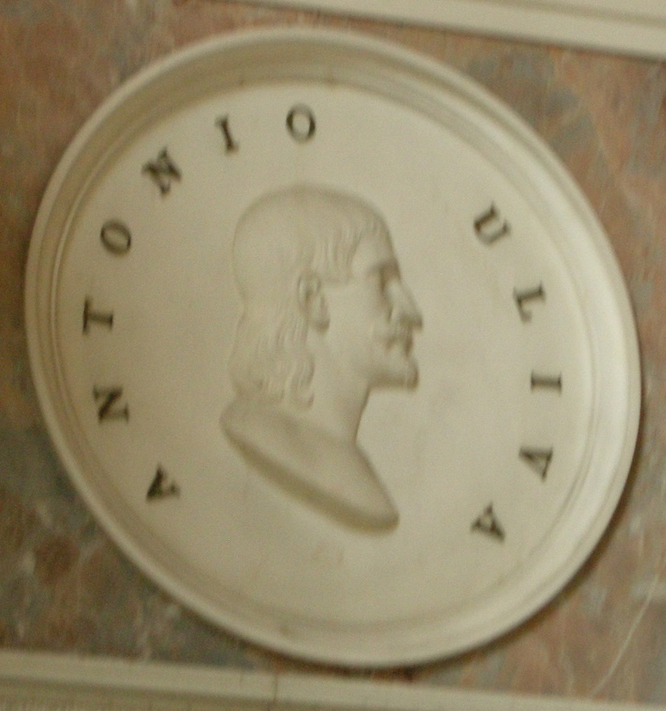 Tribuna, medaglione di antonio uliva